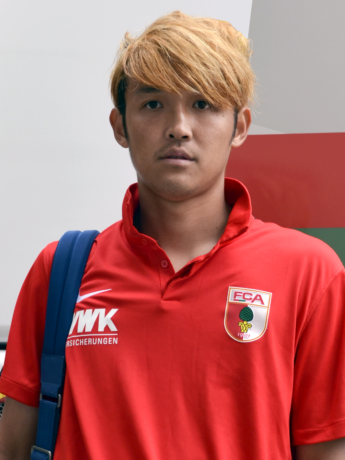 Takashi Usami beim FC Augsburg (2016)